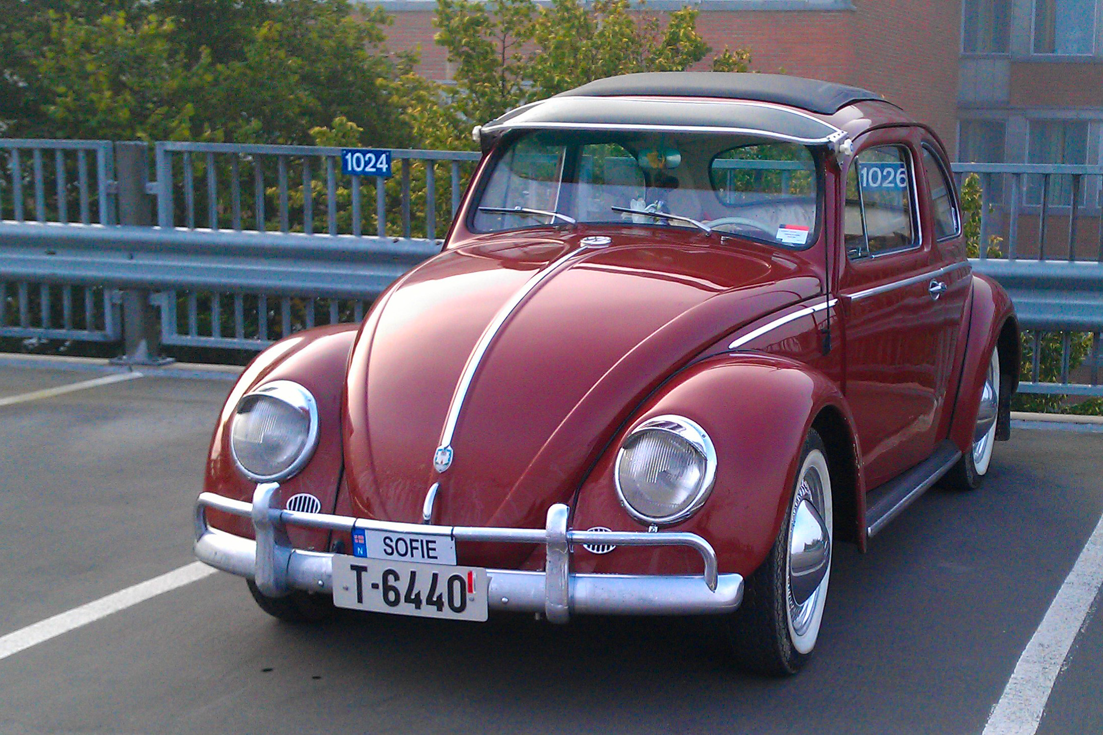 Norsk Volkswagen "boble" 1959-modell